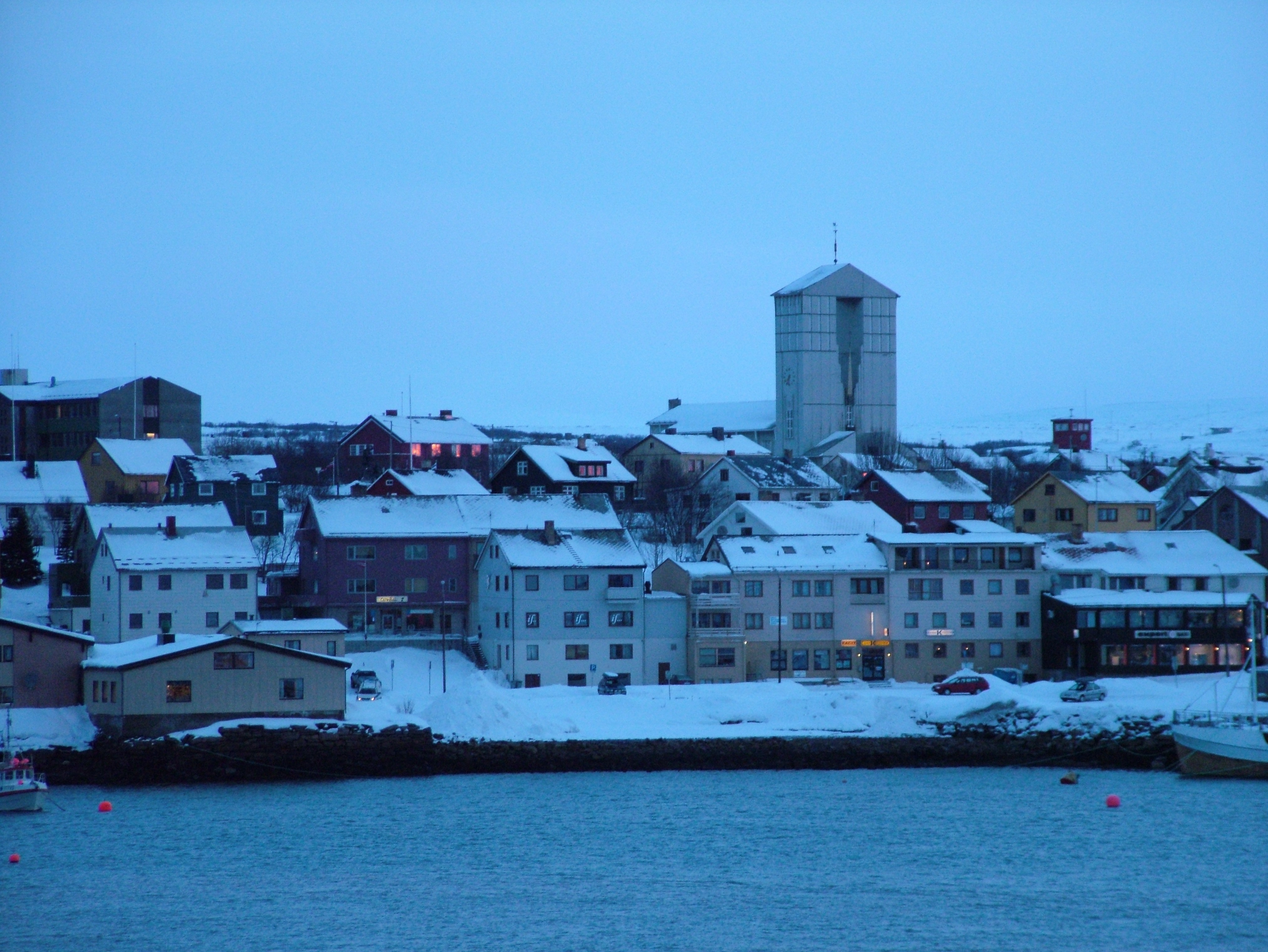 Die Kirche im Ort Vadsø in Nordnorwegen.